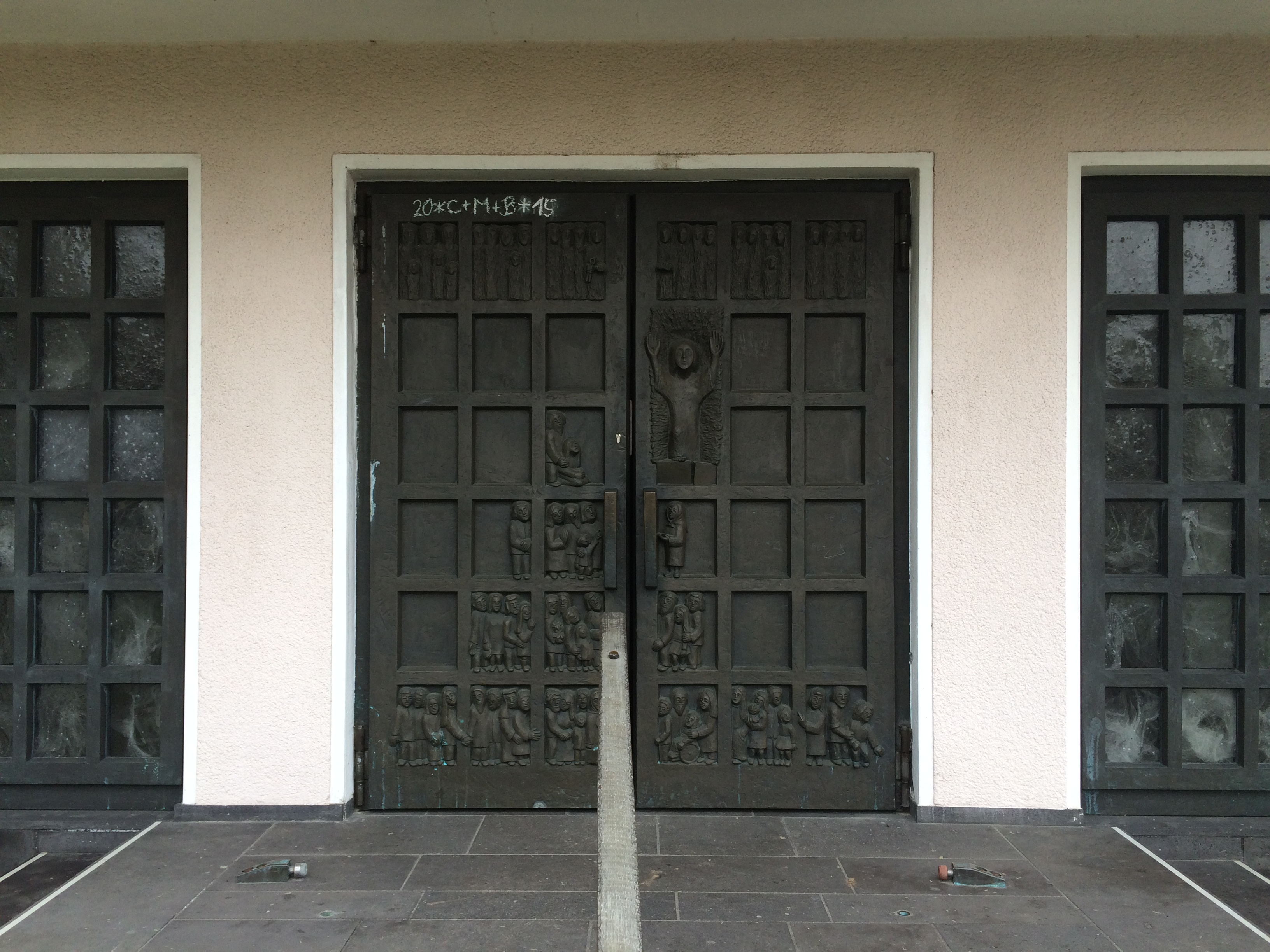 Pfarrkirche St. Mariä Heimsuchung in Sankt Augustin-Mülldorf, eine von acht Kirchen des katholischen Seelsorgebereichs Sankt Augustin.